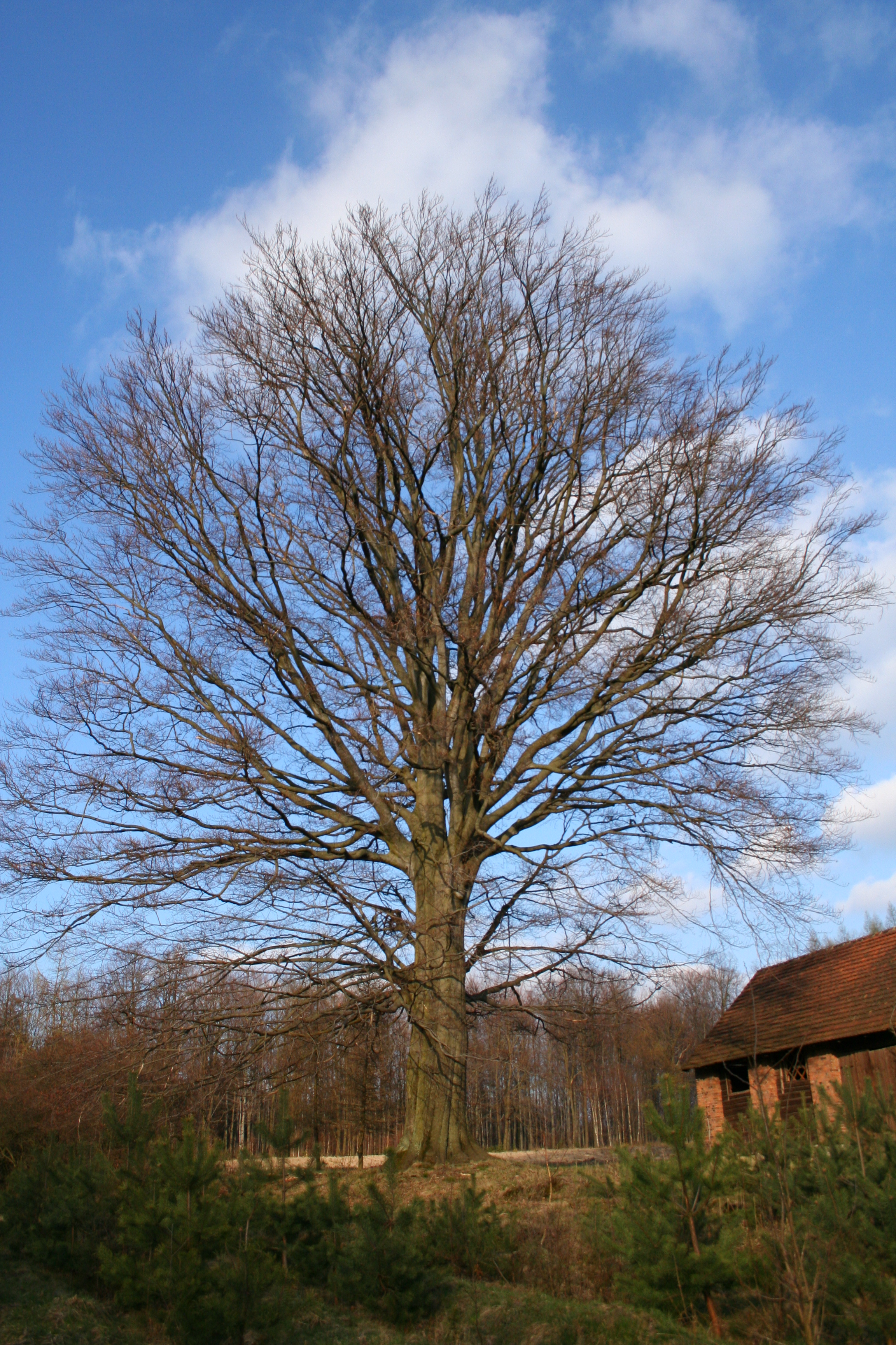 Buk w obecnie nie zamieszkałym przysiółku Szklana Huta, gmina Boronów, powiat lubliniecki, województwo śląskie